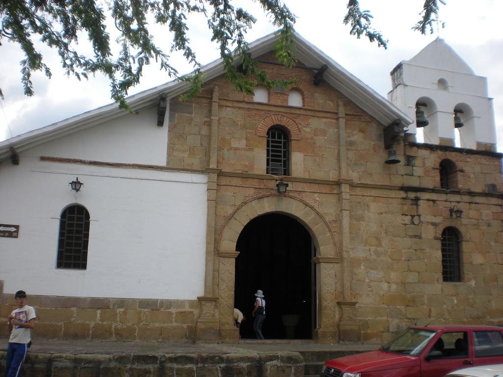 Iglesia de las Nieves, San Juan Girón, Santander (Dep.), Colombia